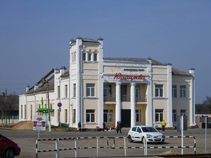 Старыя Дарогі. Цэнтр Юнацтва